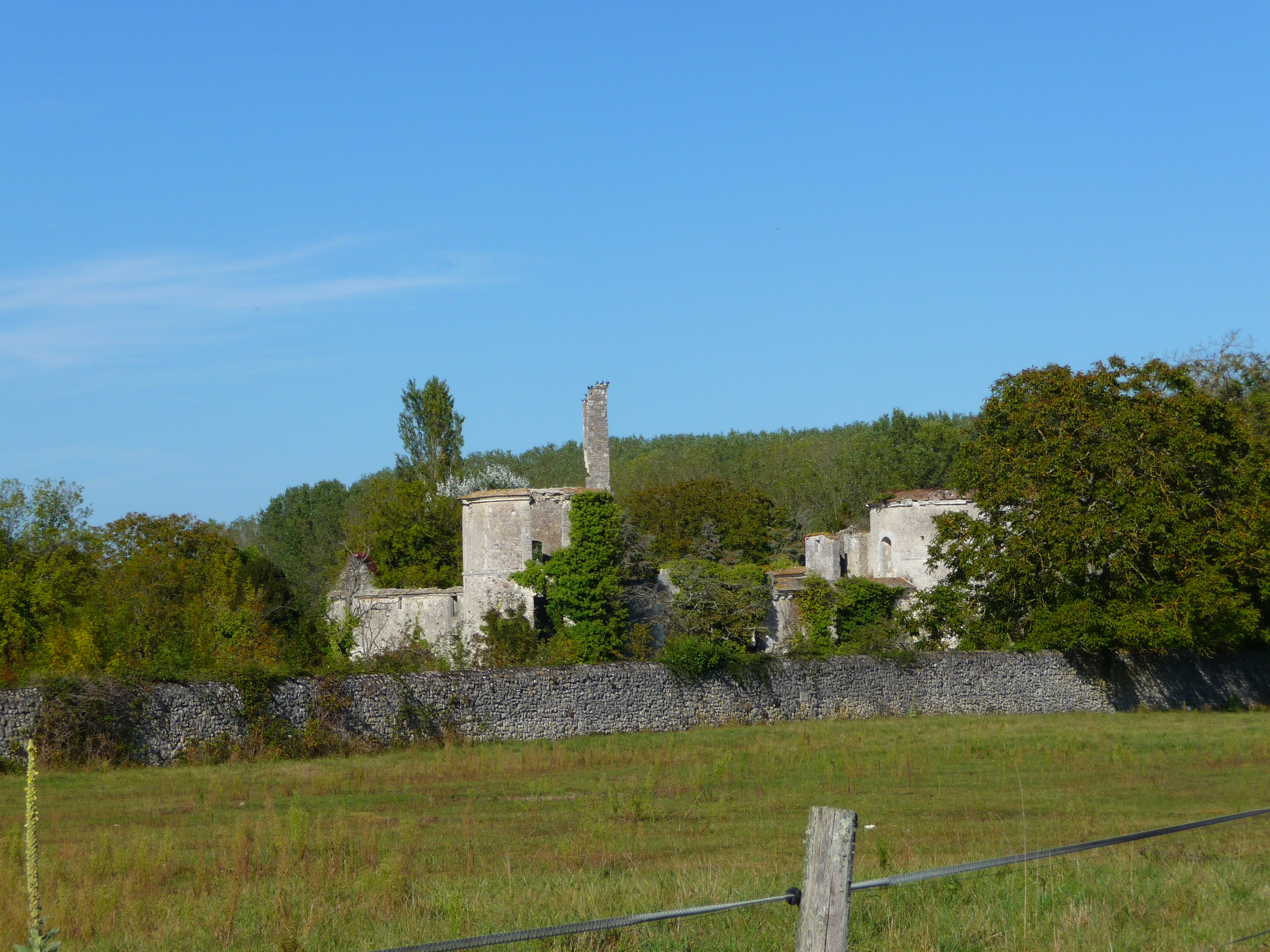 Château de Hommes